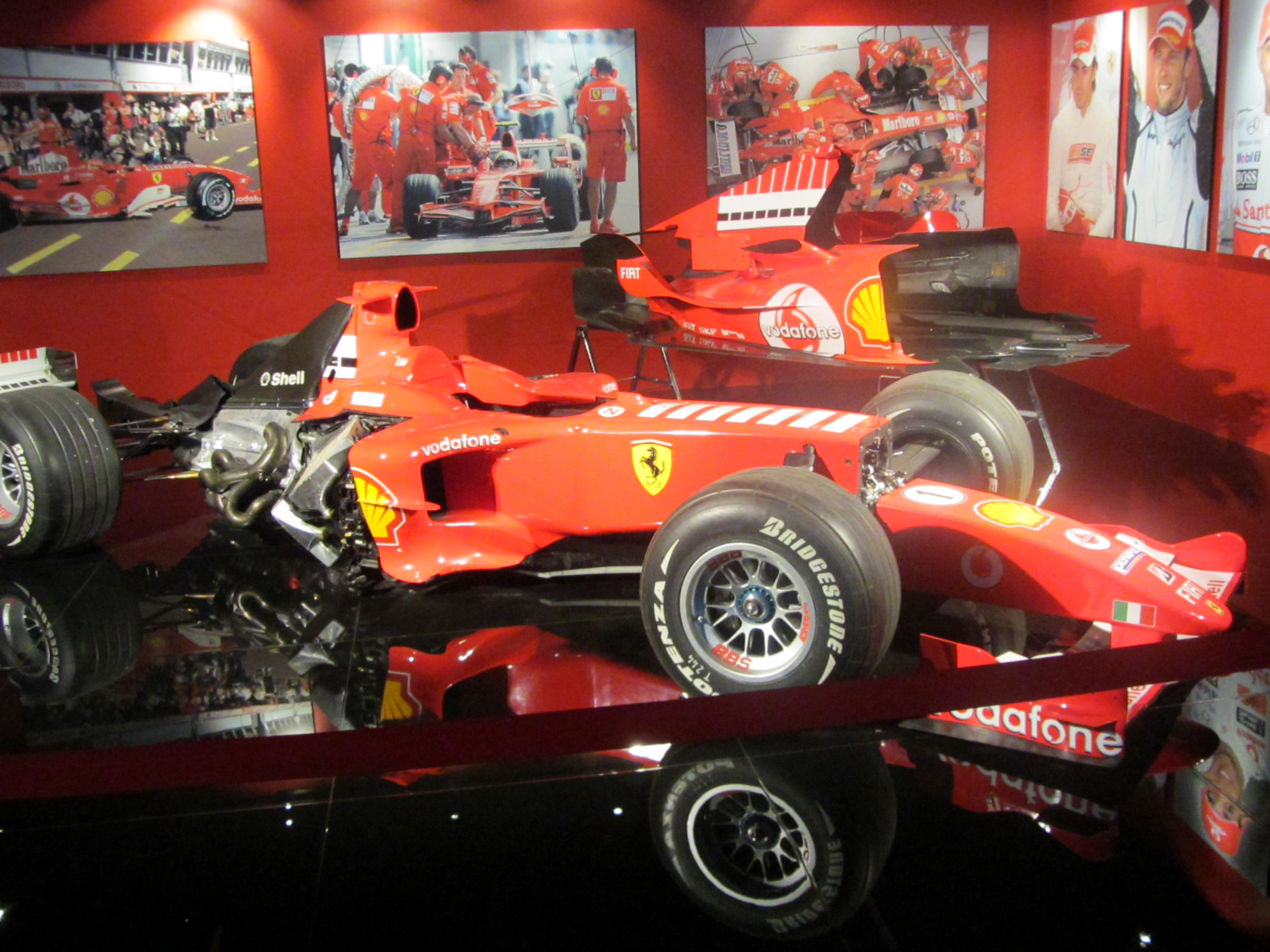 Una Ferrari F1 in mostra al Museo Nazionale dell'Automobile di Torino ( dopo il restauro 2011)